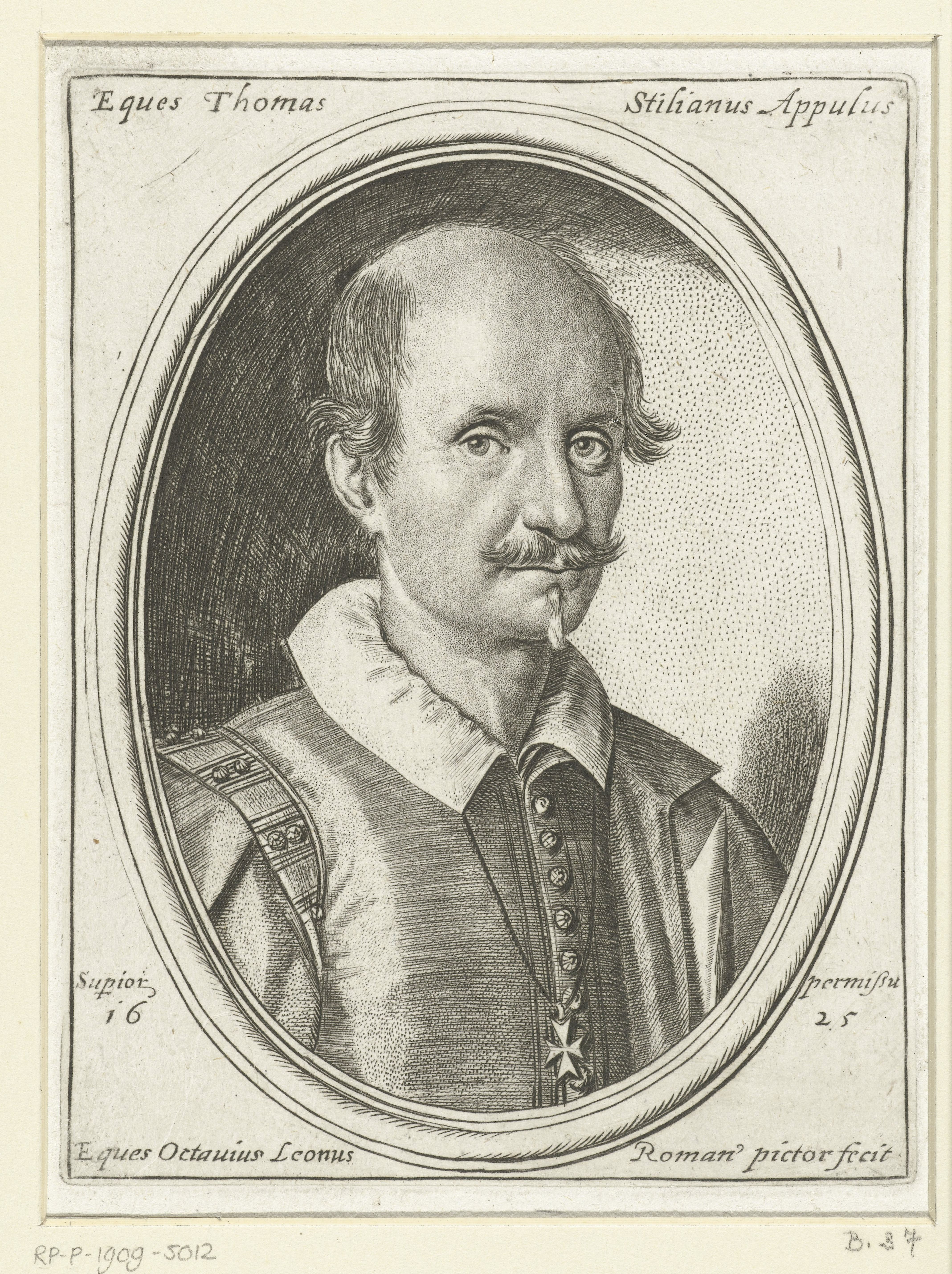 IdentificatieTitel(s): Portret van Tomasso StiglianiEques Thomas Stilianus Appulus (titel op object)Objecttype: prent Objectnummer: RP-P-1909-5012Catalogusreferentie: The Illustrated Bartsch 37Opschriften / Merken: verzamelaarsmerk, verso linksonder, gestempeld: Lugt 2228Omschrijving: Portret van de dichter Tomasso Stigliani. Aan een ketting om zijn nek hangt het kruis van de Malterser Orde.VervaardigingVervaardiger: prentmaker: Ottavio Mario Leoni (vermeld op object)naar eigen ontwerp van: Ottavio Mario LeoniPlaats vervaardiging: ItaliëDatering: 1625Fysieke kenmerken: ets en stippeletsMateriaal: papier Techniek: etsenAfmetingen: plaatrand: h 144 mm × b 110 mmOnderwerpWat: portrait of a writerWie: Tommaso StiglianiVerwerving en rechtenVerwerving: aankoop 1905Copyright: Publiek domein